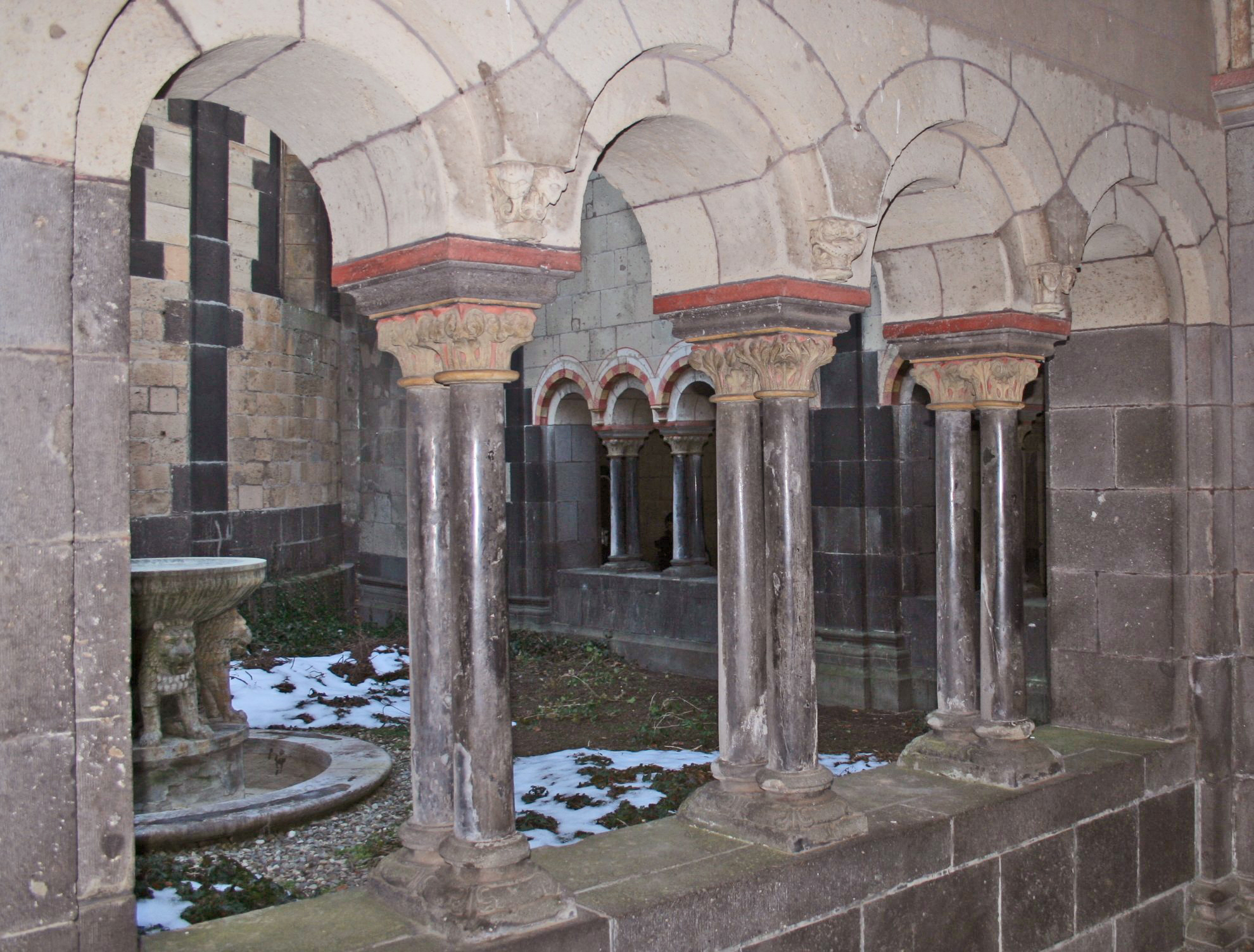 Aganksberäich vun der Abteikierch Maria Laach.